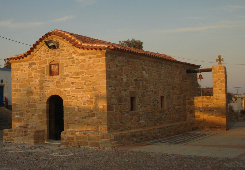 Cerkiew w Kiotari na Rodos